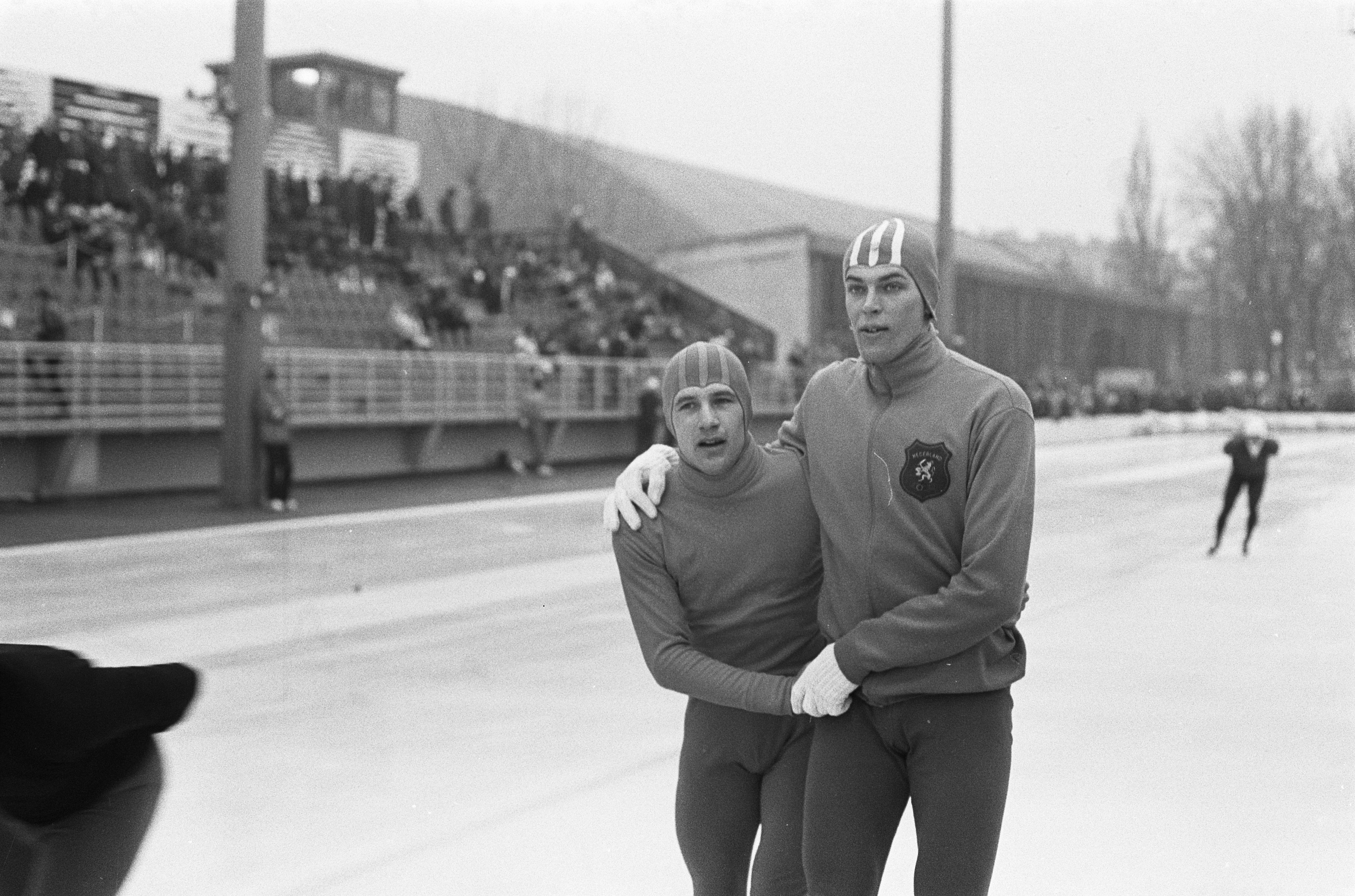 Collectie / Archief : Fotocollectie Anefo Reportage / Serie : [ onbekend ] Beschrijving : Olympische Winterspelen te Grenoble. Kees Verkerk (links), winnaar van de gouden medaille op de 1500 meter en Ard Schenk, winnaar van de zilveren medaille. Datum : 15 februari 1968 Locatie : Grenoble Trefwoorden : schaatsen, sport Persoonsnaam : Schenk, Ard, Verkerk, Kees Instellingsnaam : Olympische Winterspelen Fotograaf : Kroon, Ron / Anefo Auteursrechthebbende : Nationaal Archief Materiaalsoort : Negatief (zwart/wit) Nummer archiefinventaris : bekijk toegang 2.24.01.05 Bestanddeelnummer : 921-0848